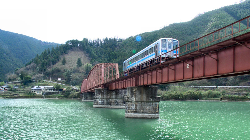 JRja:肥薩線ja:鎌瀬駅付近で撮影 球磨川第一橋梁を渡る普通列車(国鉄キハ31形気動車)。 写真手前がja:八代駅方面。水面はja:球磨川のja:荒瀬ダム湖。 撮影者/著者/著作権保有者 : MK Products (本人がアップロード) 撮影日 : 2007/03/07 肥薩線用にアップロードした画像です。良い画像があれば別の画像に変えてください。 Category:ディーゼル列車画像 Category:鉄道路線画像 Category:八代市の画像 Category:橋画像